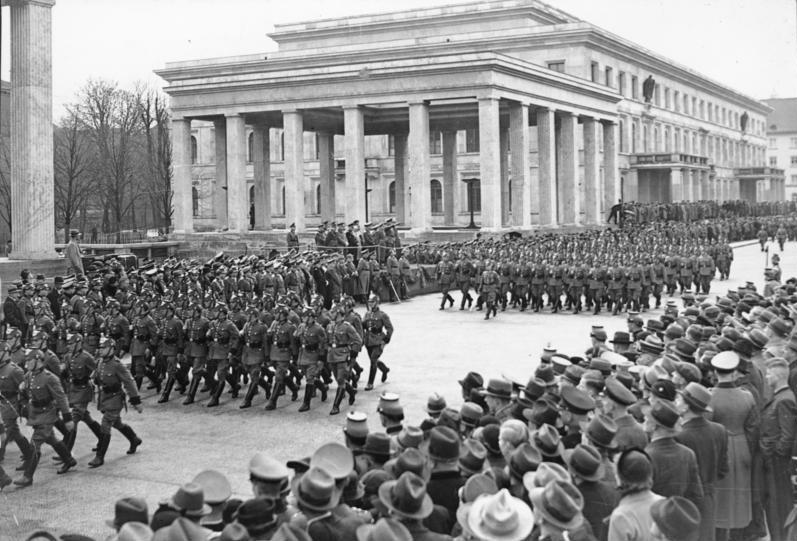 München, Königsplatz, Polizeiparade vor Kurt Daluege Ordnungspolizei aus Österreich heimgekehrt Am Sonntagvormittag fand auf dem Königlichen Platz in München eine feierliche Abschlussparade statt. Nach einer Ansprache des Gauleiters und Staatsministers Adolf Wagner nahm der Chef der Ordnungspolizei SS-Obergruppenführer General Daluege den Vorbeimarsch ab. Im Hintergrund erkennt man die Ehrentempel für die Gefallenen der Bewegung. 24.4.1938 5480-38